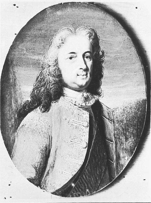 Landgraf Karl von Hessen, 1720, Bild, Kassel, Staatliche Kunstsammlungen, Schloß Wilhelmshöhe